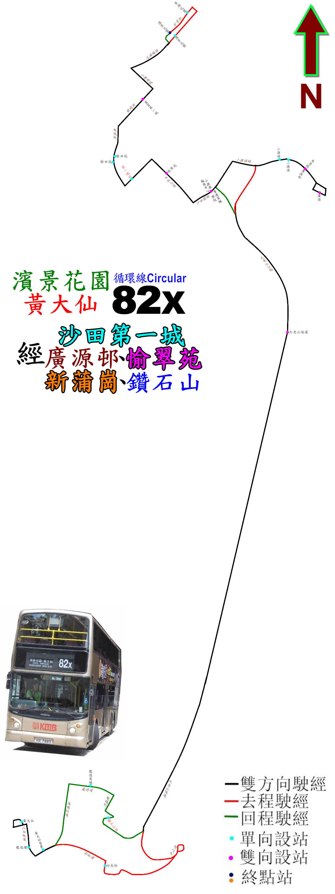 中文（香港）: 九巴82X線的走線圖